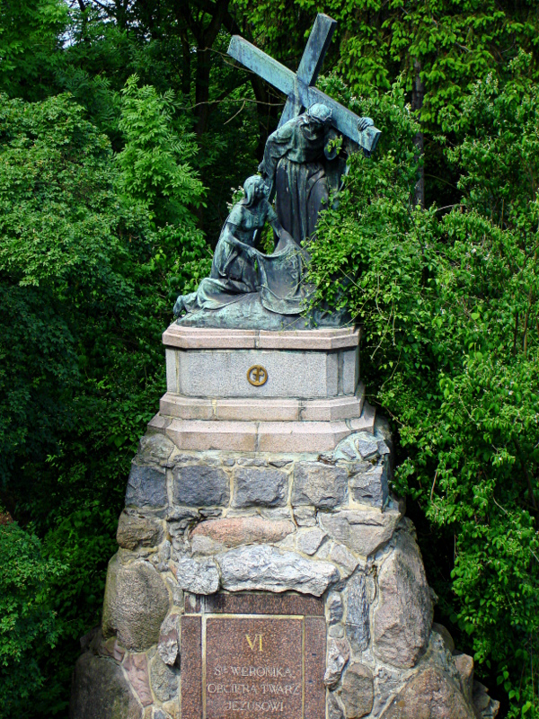 Zespół klasztorny oo. Paulinów: Kościół pw. Wniebowzięcia NMP i Znalezienia Krzyża Św. z kaplicami, zakrystią, skarbcem, wieżą, klasztorem, zabudowaniami gospodarczymi, arsenałem, drukarnią, domem muzykantów, twierdzą z bramami i bastionami, park Częstochowa, Częstochowa 02.1978.